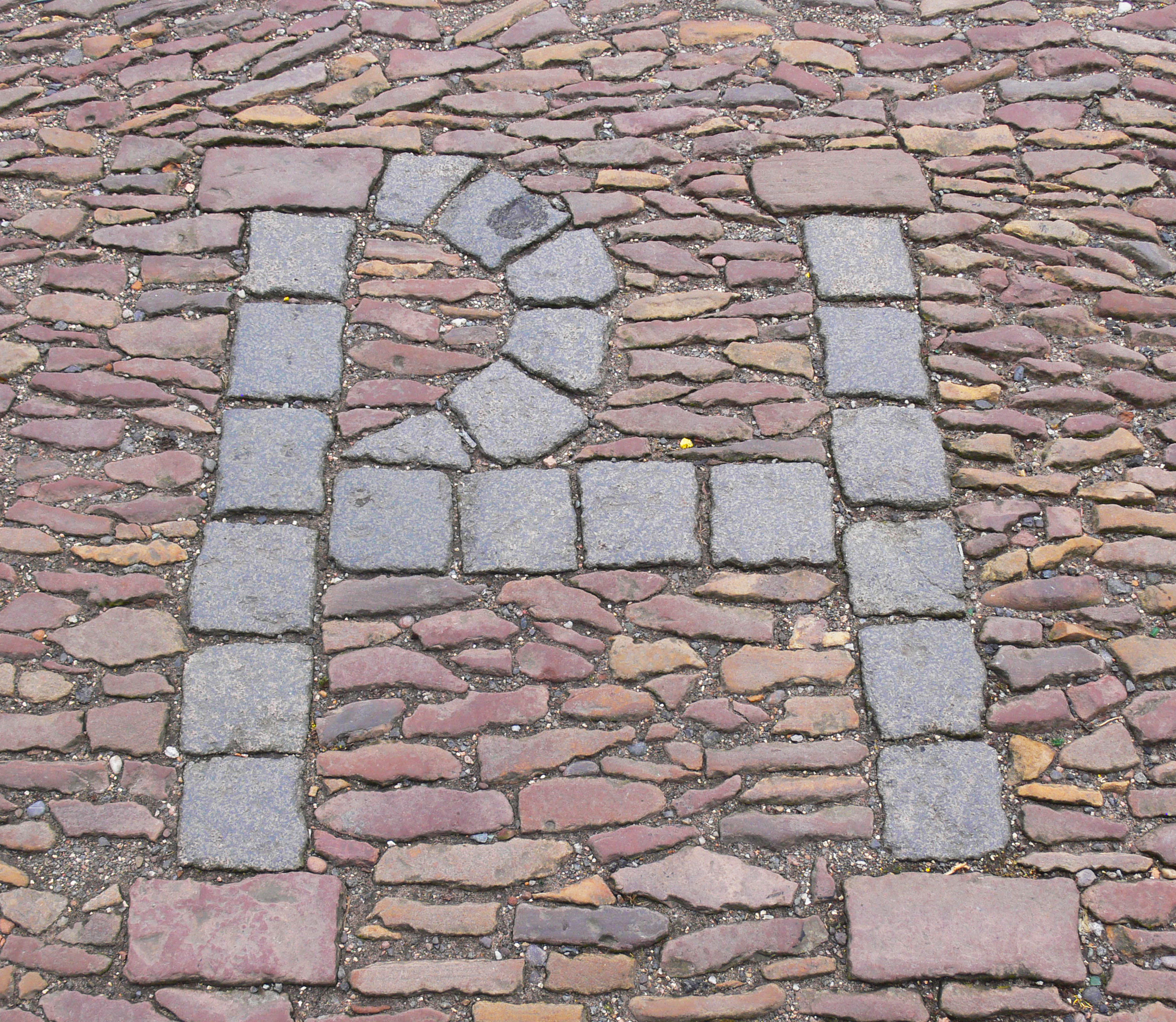 St Andrews - PH at the entrance of St Salvator's Chapel